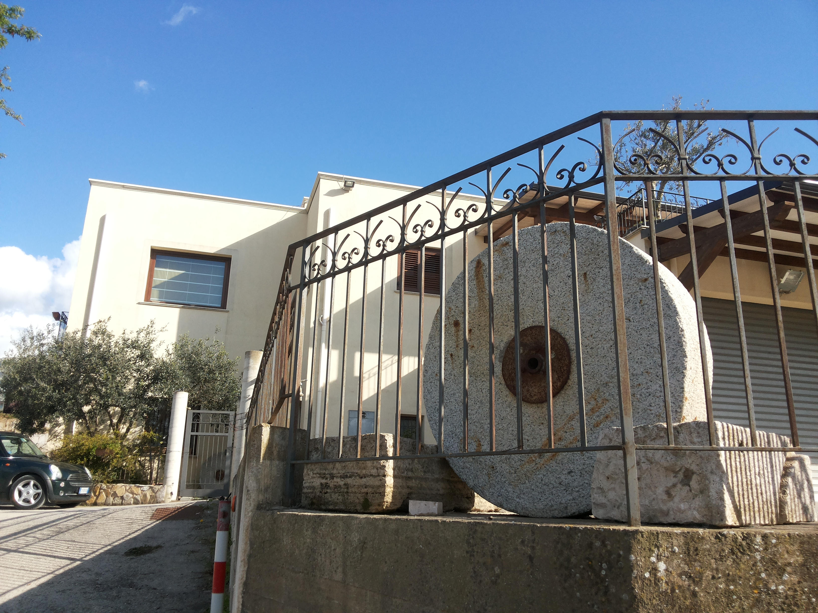 Antico Frantoio Vallone - Alcamo